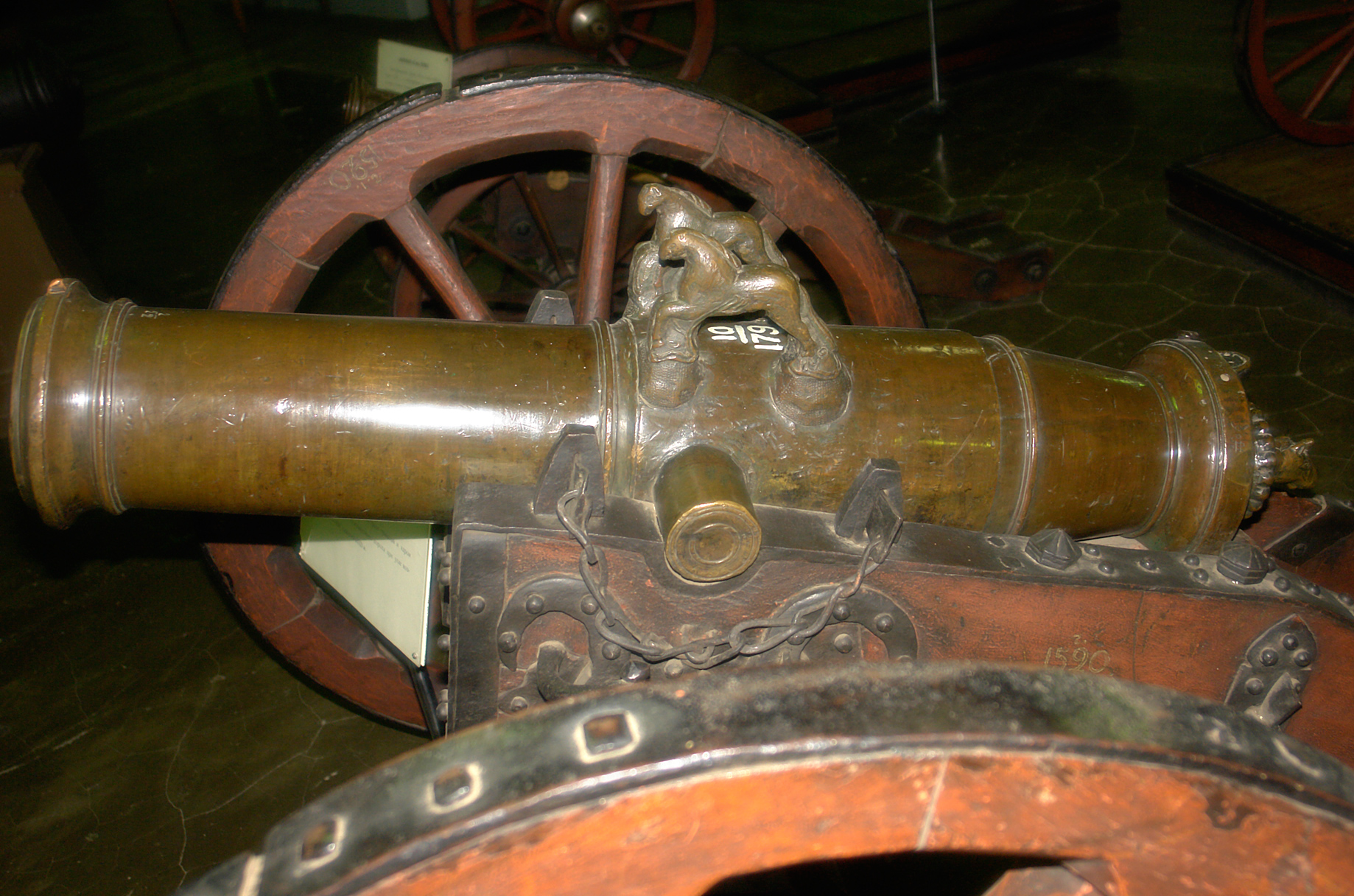 Ствол 8-фунтового (107-мм) полковго единорога. Ствол бронзовый. Длина 114 см. Масса 180 кг. Отлит во второй половине XVIII в. Дальность 852 м.